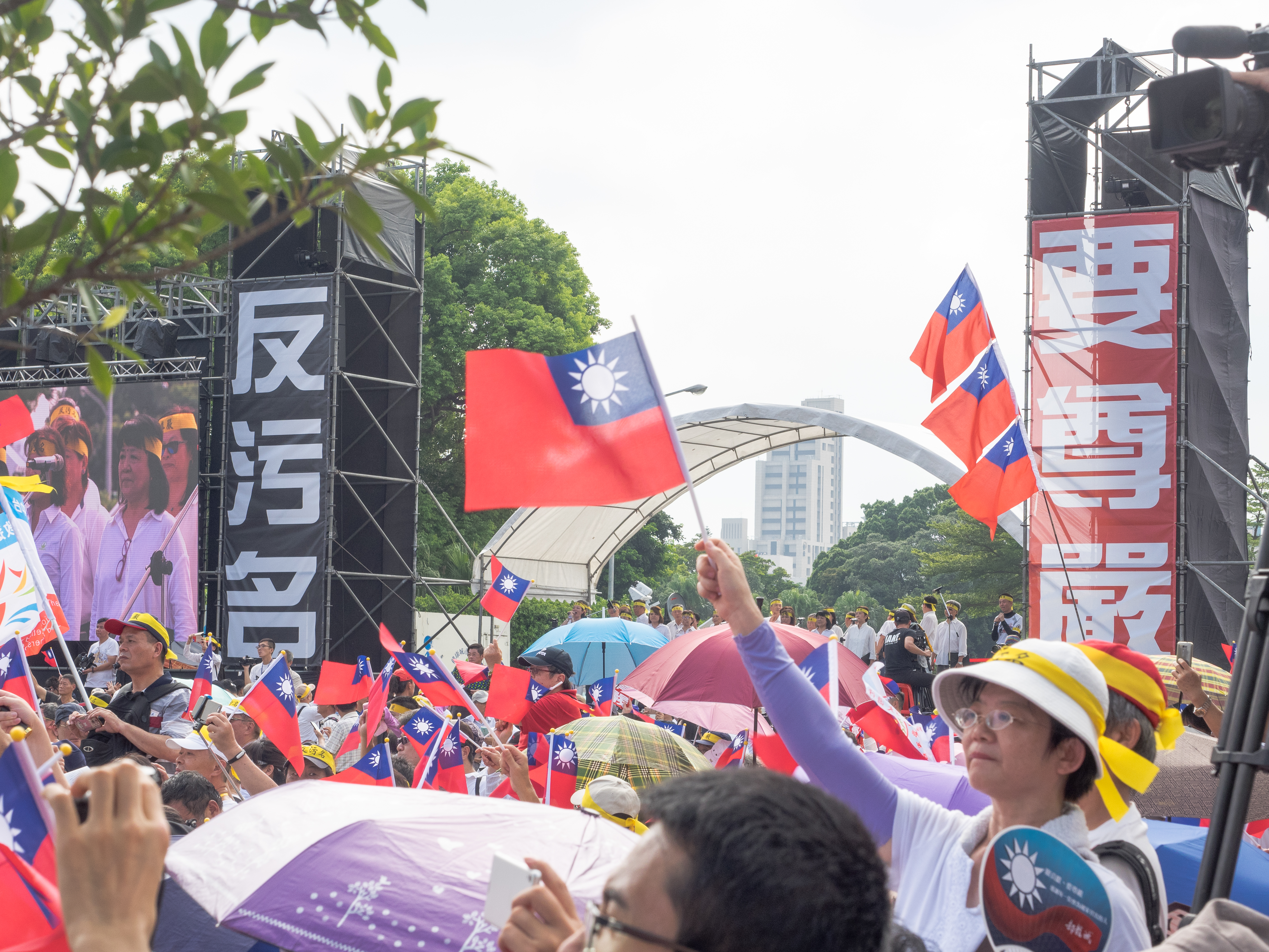 OLYMPUS DIGITAL CAMERA 2016-09-03 軍公教上街